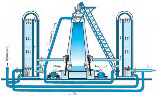 Ջուջի արտադրություն